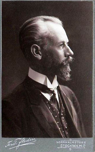 Gustaf Lagerheim